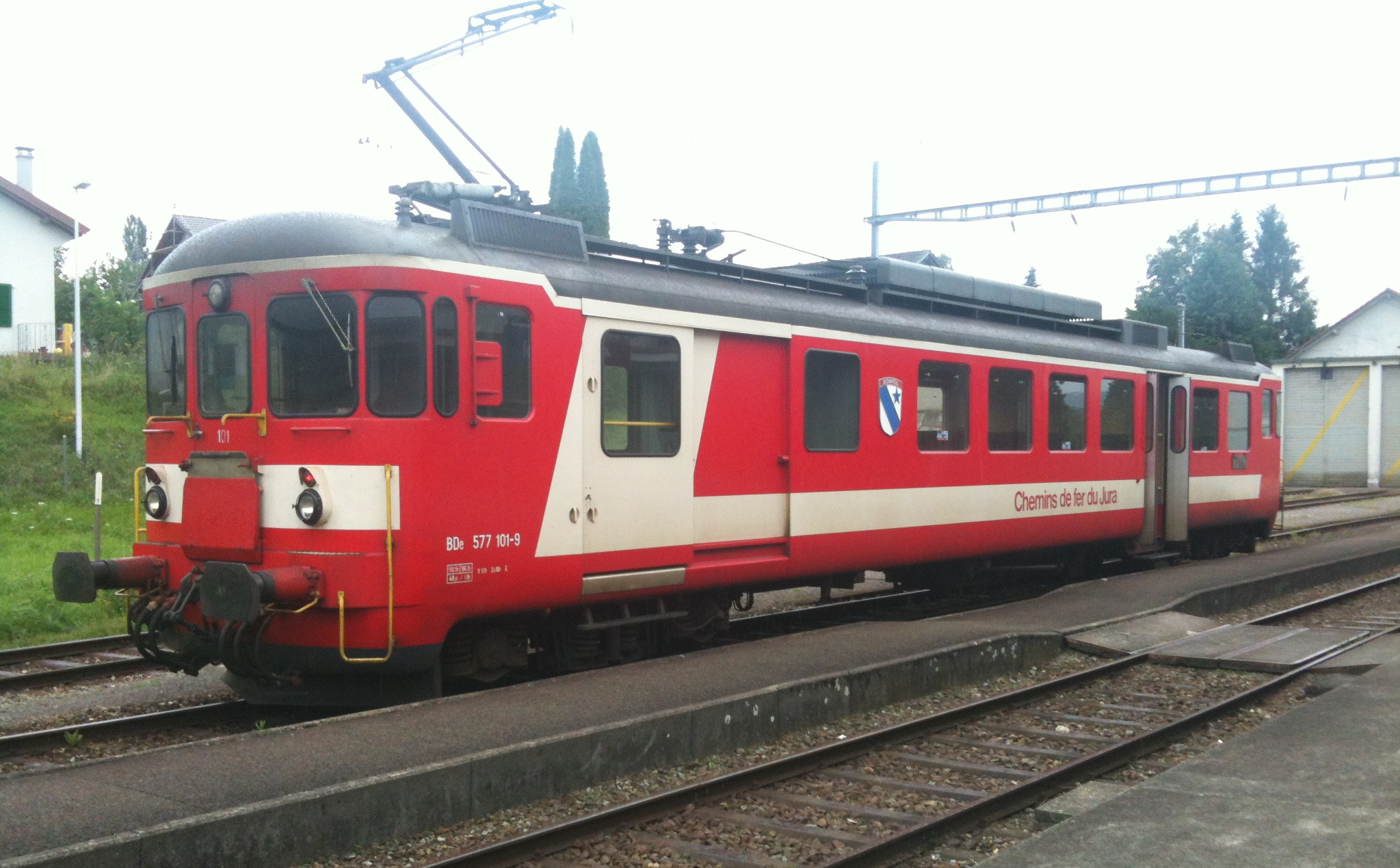 L'automotrice électrique BDe 4/4 577 101-9 des Chemins de fer du Jura à Bonfol en juillet 2012